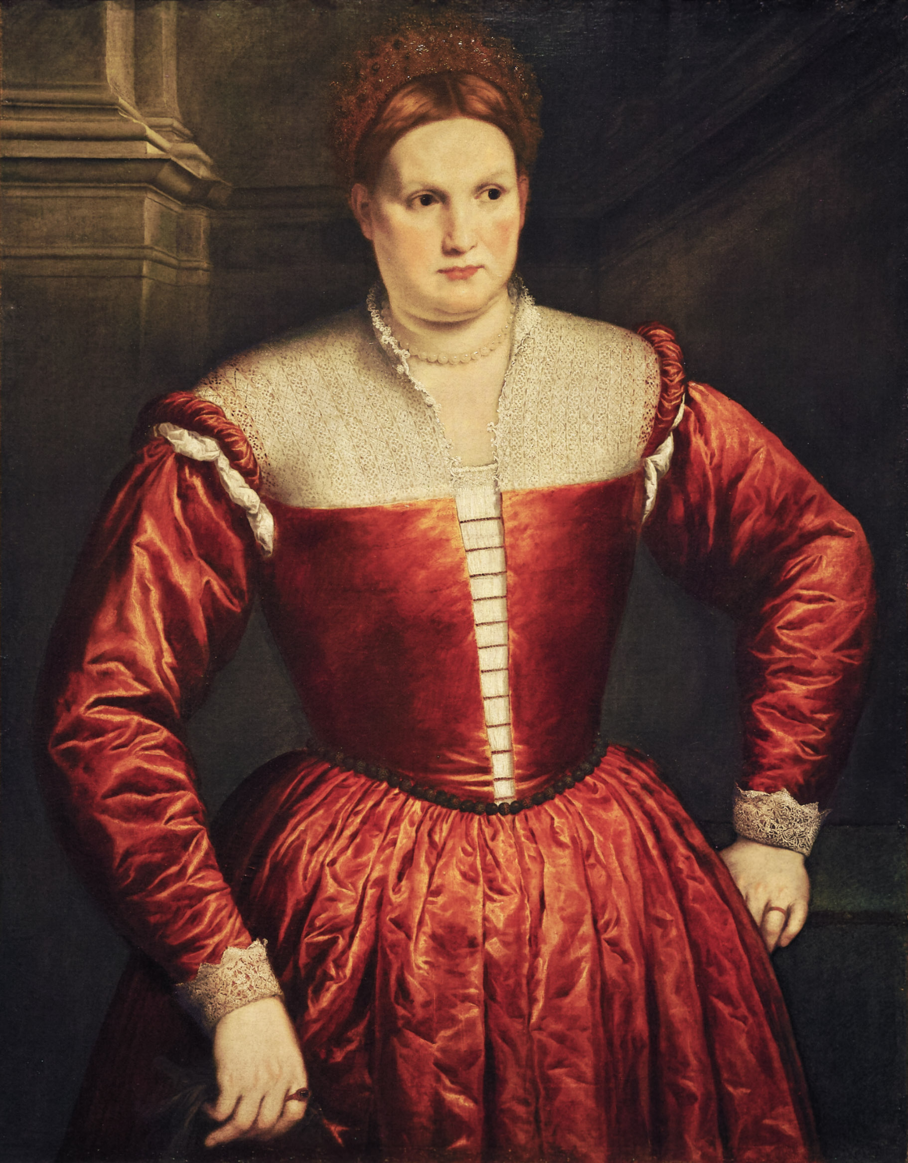 Portrait de femme. Balia dei Medici. Galería Palatina. Palazzo Pitti. Florencia. Italia. high resolution at